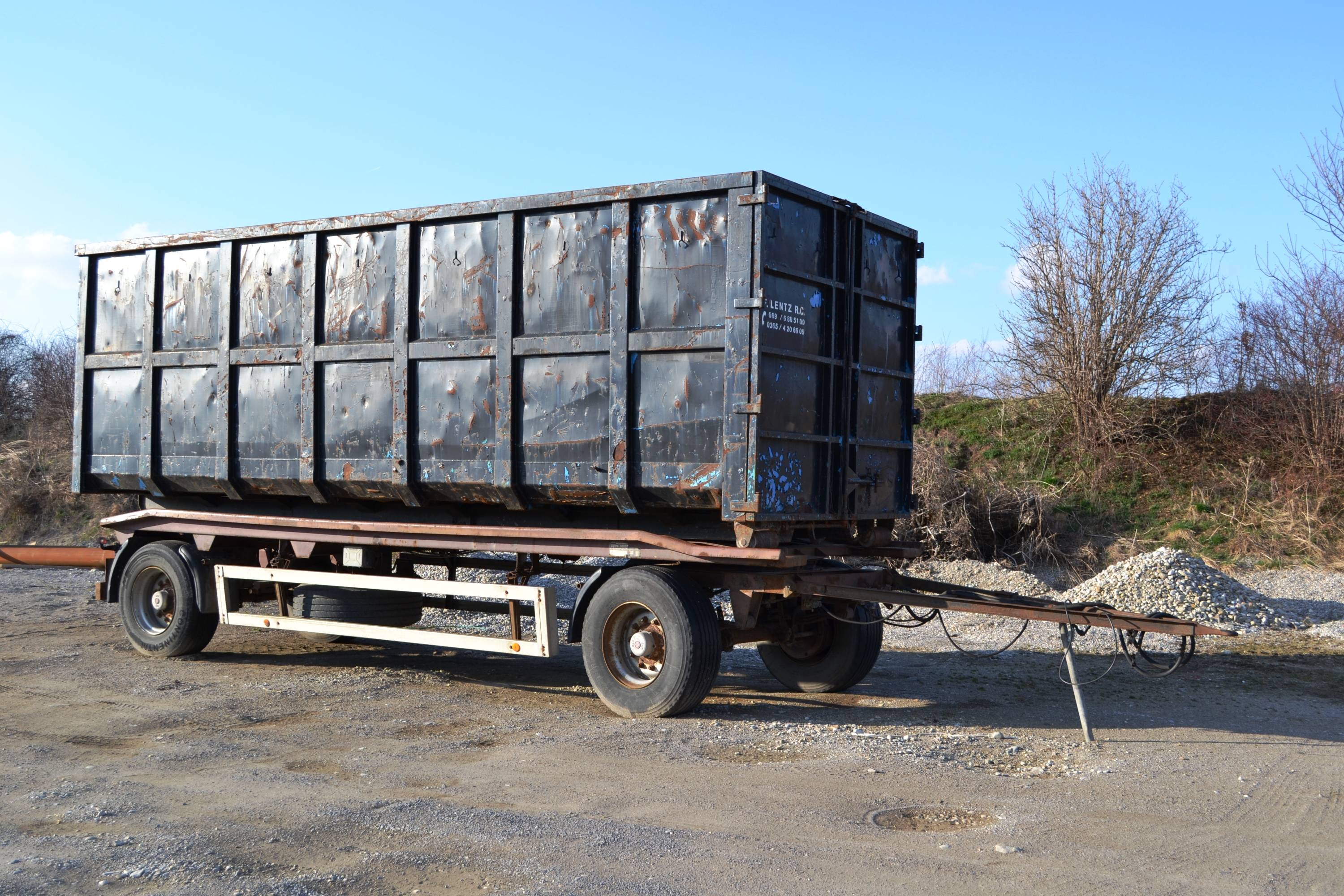 LKW-Anhänger, abgestellt auf einem Parkplatz in der Nähe von München.